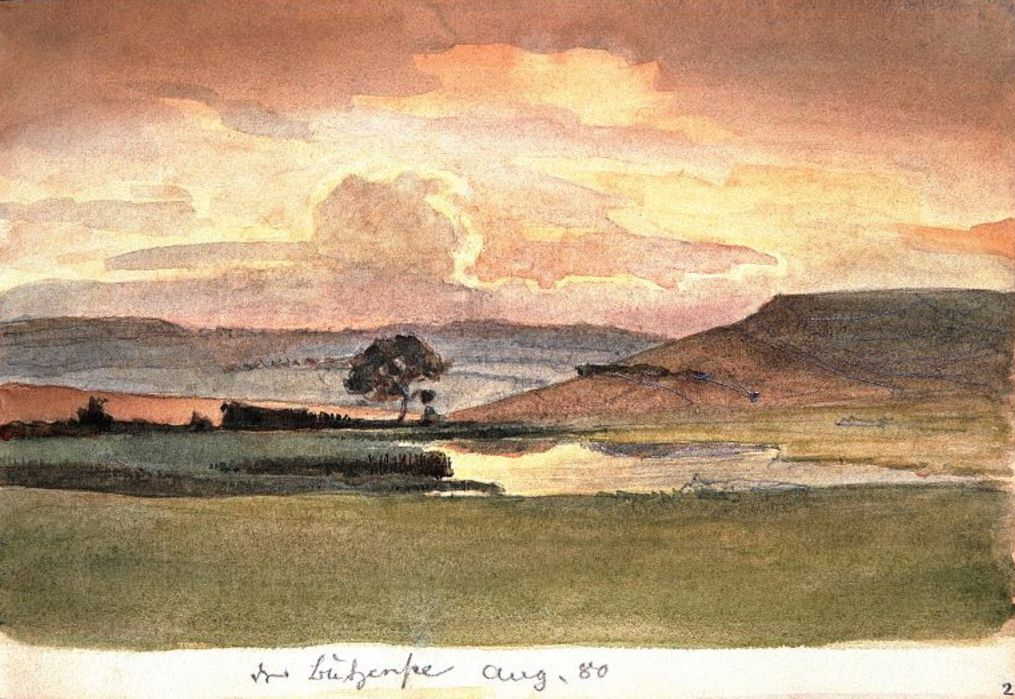 Der Butzensee bei Bodelshausen. Blick über Wiese zum See. (Aquarell)